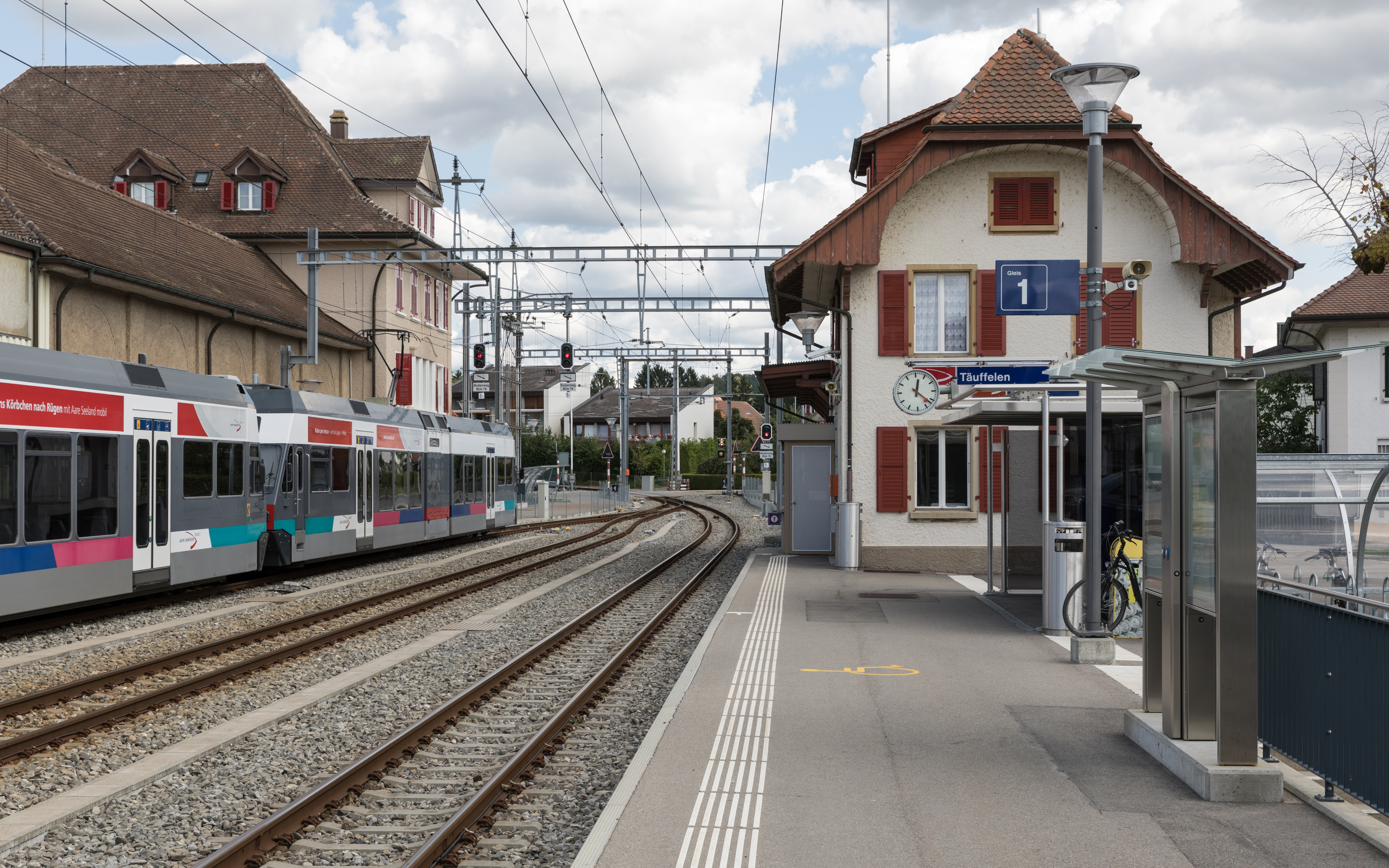 Bahnhof Täuffelen und Betriebsgebäude der vormaligen Biel-Täuffelen-Ins-Bahn (links)